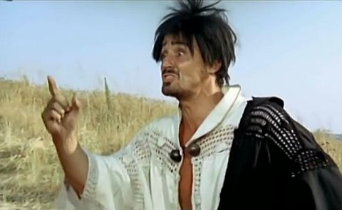 Screenshot from L’armata Brancaleone directed by Mario Monicelli